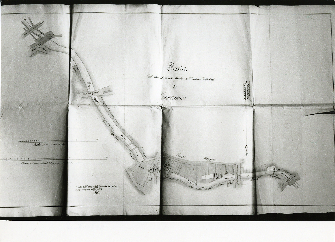 Servizio fotografico : Cesena, 1972 / Paolo Monti, Istituto di fotografia Paolo Monti. - Stampe: 4 : Positivo b/n, gelatina bromuro d'argento/ carta, 24x30. - ((Al verso delle stampe manoscritti i numeri dei negativi corrispondenti: 2250/3, 2250/5, 2250/9A. Sul coperchio della scatola, manoscritto a pennarello: "Copie/ Anzola 6x6 Provini". - Occasione: Campagna di rilevamento (prima) del centro storico. - Fonte: Monografia di Dradi Maraldi Biagio, Emiliani Andrea (a cura di): Cesena: il volto della città, Cesena, Banca Popolare di Cesena (1973)